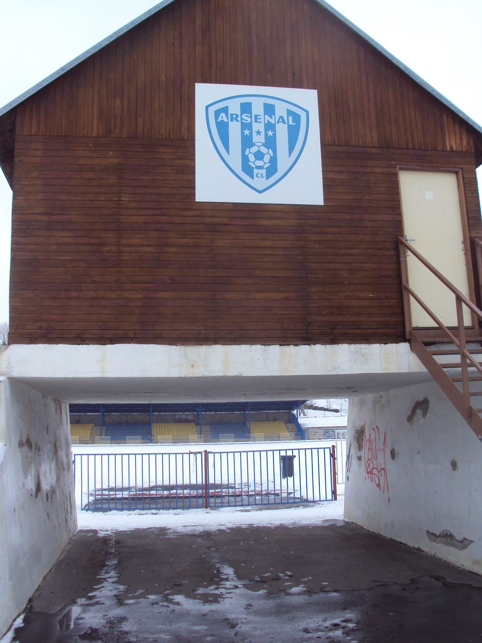 Znak fotbalistů na jedné z budov u hřiště